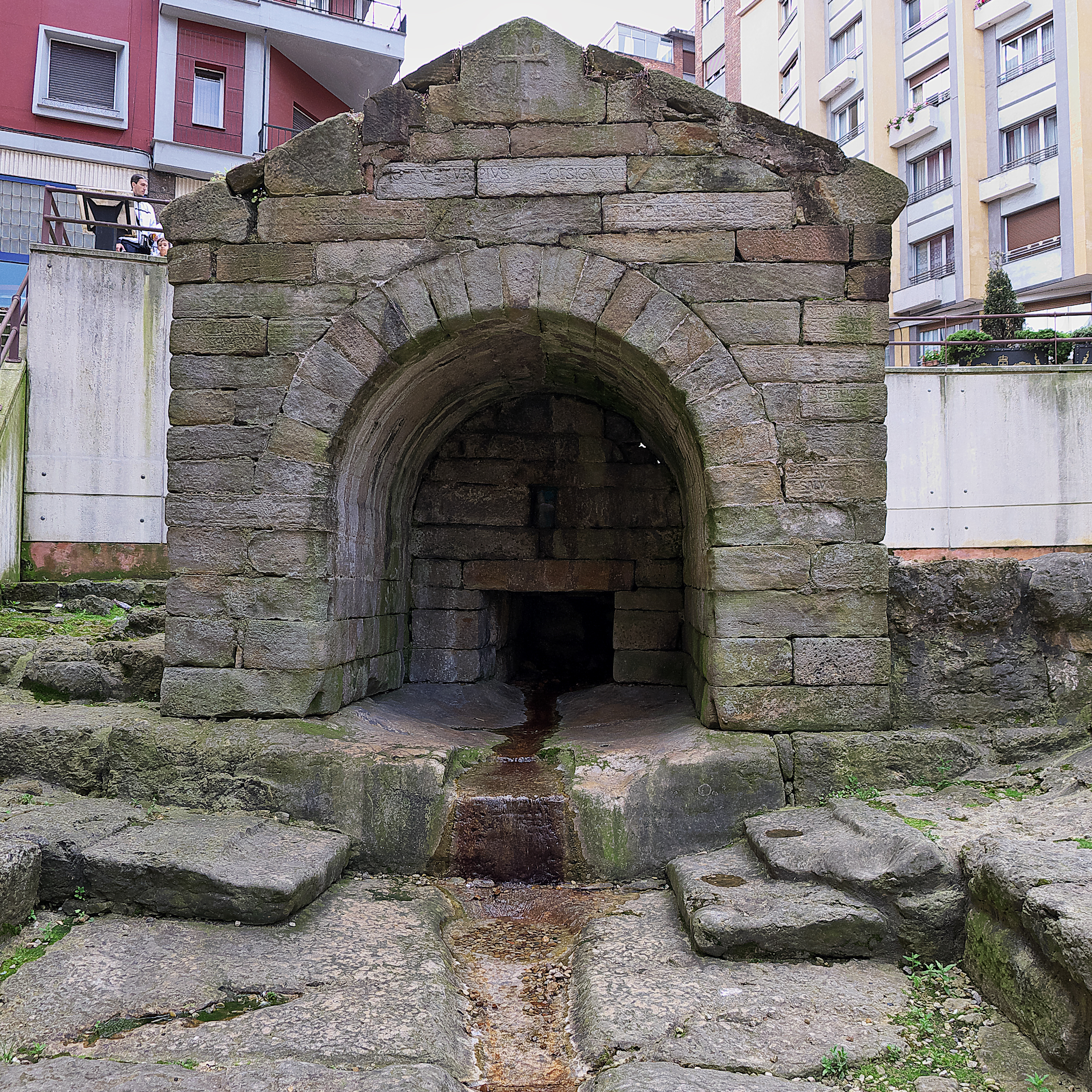 La construcción civil en el arte prerrománico asturiano (866-910).